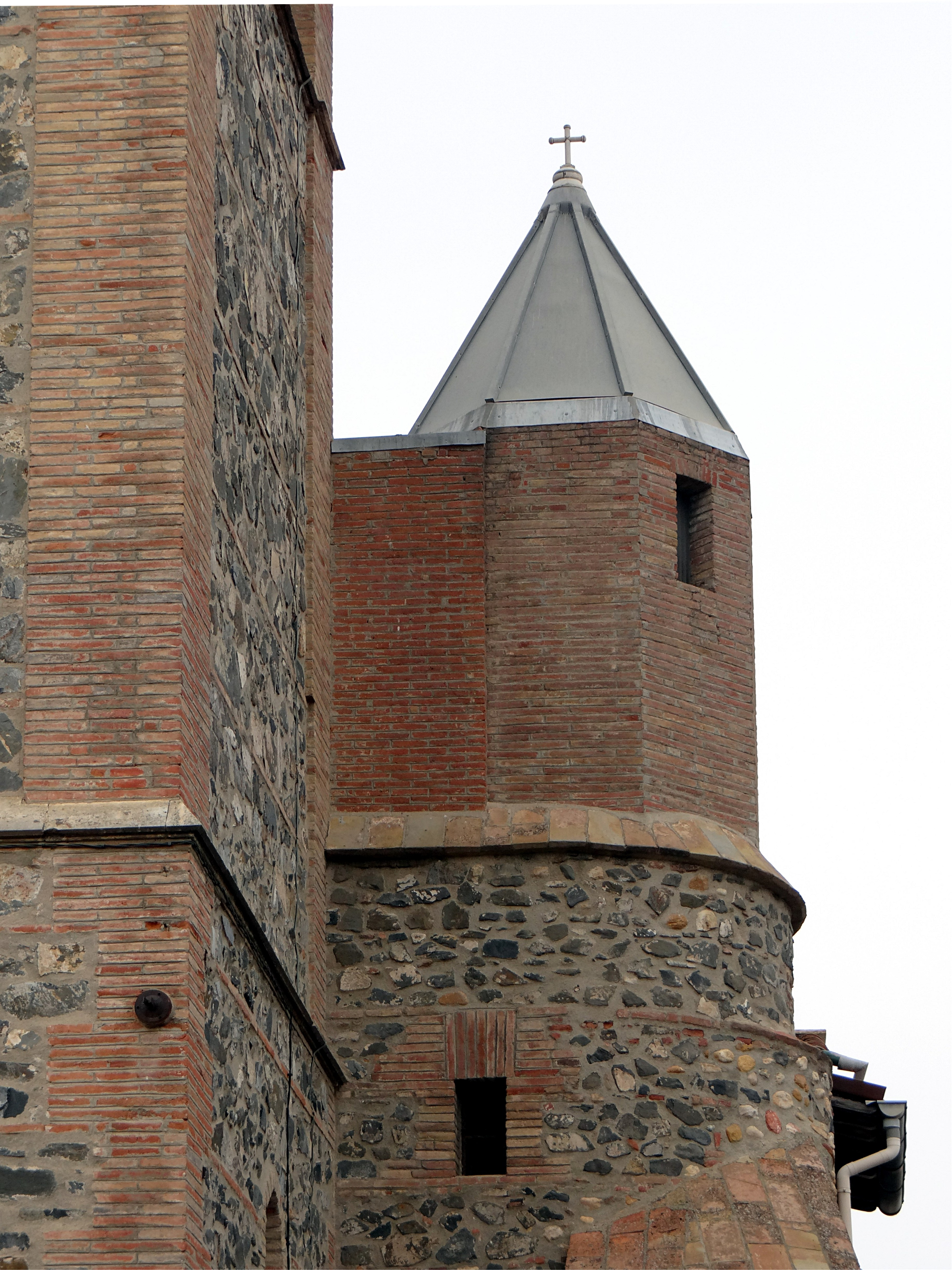 Tour latérale de l' église Saint-Cirq et Sainte-Julitte, Pia, Pyrénées-Orientales, France.